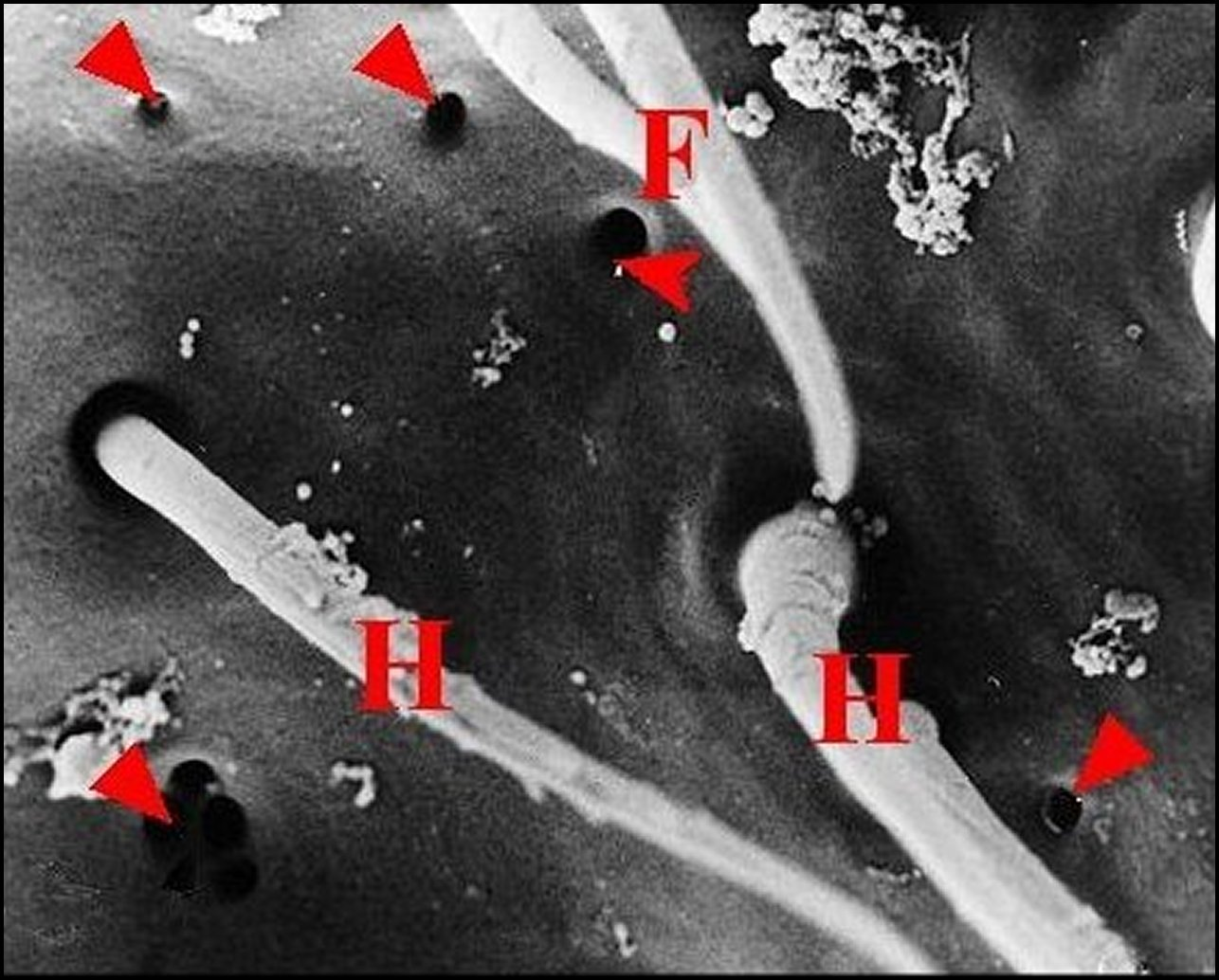 Pores des glandes tégumentaires épigastriques de Meta menardi au microscope électronique à balayage.